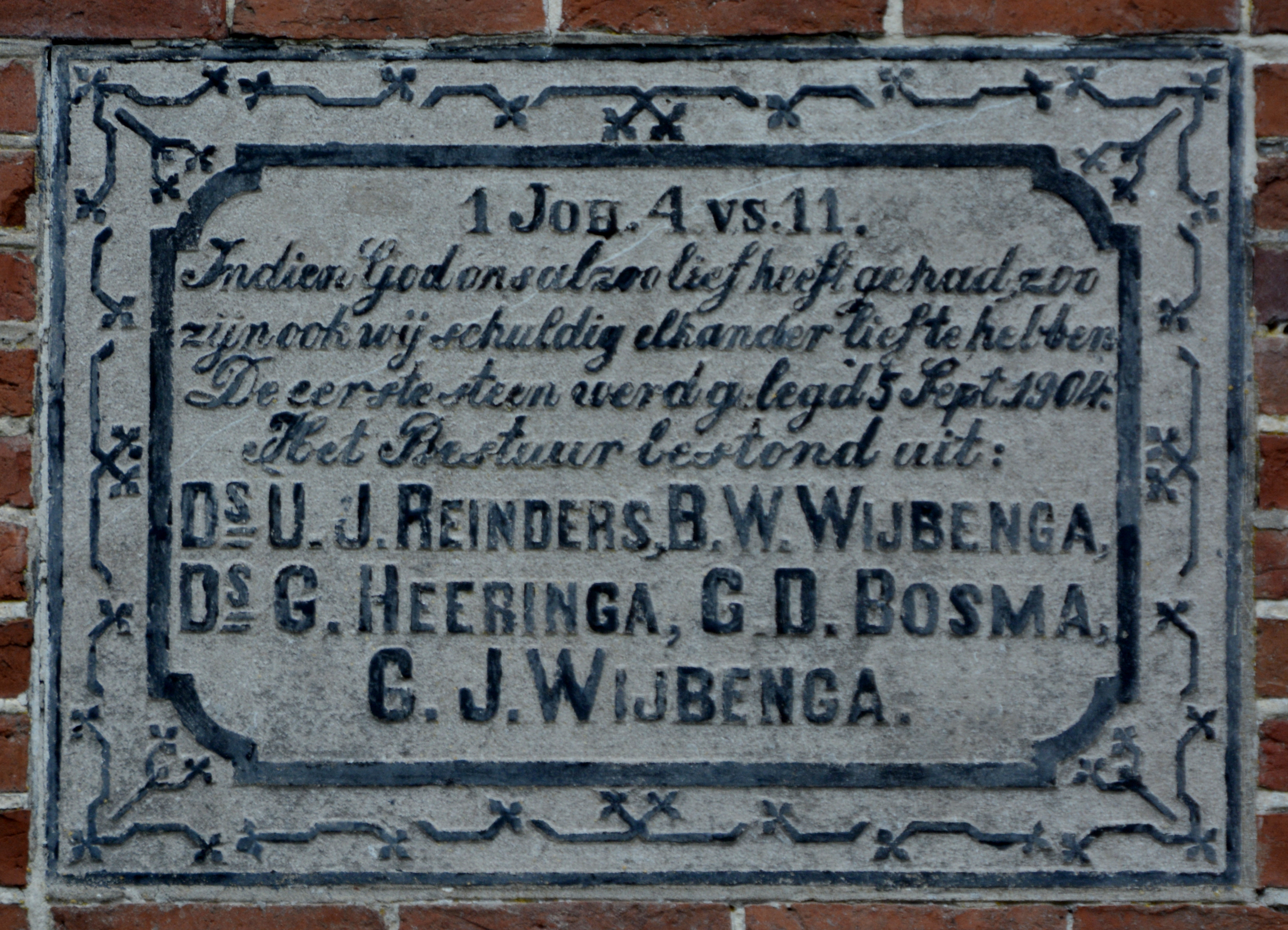 Zwaagwesteinde, gevelsteen doopsgezinde kerk